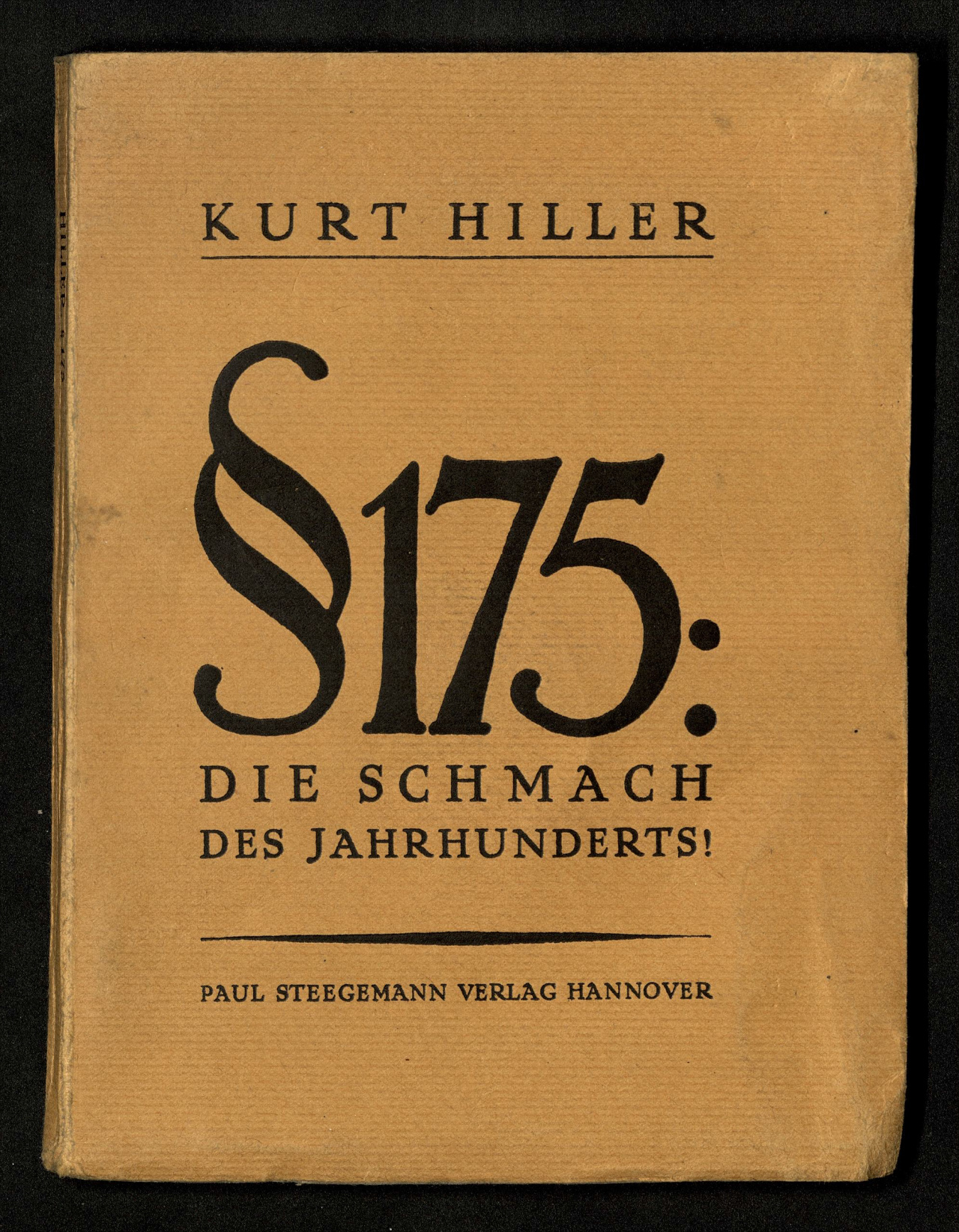 Kurt Hiller: § 175: Die Schmach des Jahrhunderts! (1922); photo of cover. Bild:Einweisung.jpg